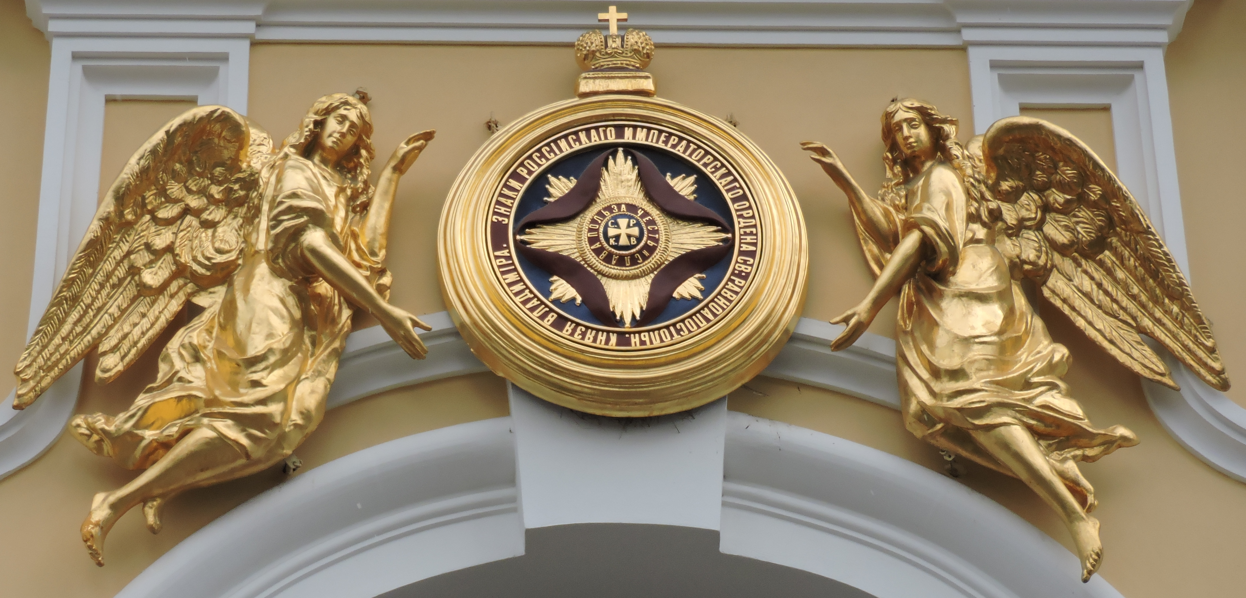 Ангелы Князь-Владимирского собора